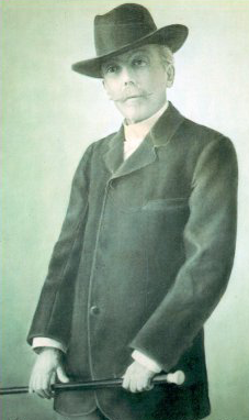 Enrico Costa (Sassari, 11 aprile 1841 – Sassari, 26 marzo 1909) è stato uno scrittore italiano. È generalmente ritenuto come il più alto esponente del romanzo storico sardo